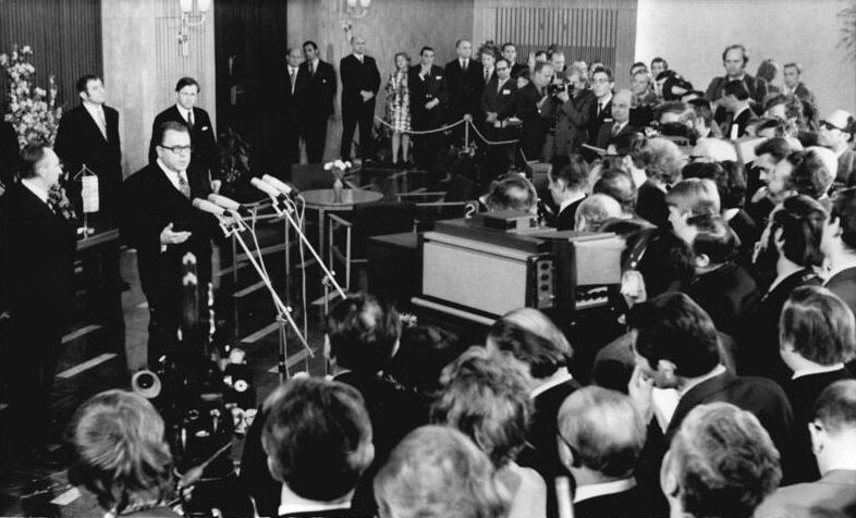 ADN-ZB Link-21.12.72 Berlin: Nach der Unterzeichnung des Berliner Vertrages über die Grundlagen der Beziehungen zwischen der DDR und der BRD am 21.12.1972 im Festsaal des Hauses des Ministerrates fand ein Pressegespräch statt. Der Staatssekretär beim Ministerrat der DDR Dr. Michael Kohl (stehend r. ) und der Bundesminister für besondere Aufgaben Egon Bahr beantworteten Fragen der Journalisten. (siehe ADN-Meldung)